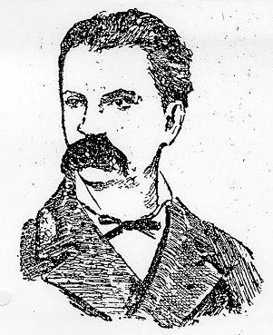 Roberto Sacchetti, Italian writer ("Scapigliatura") (1847-1881)